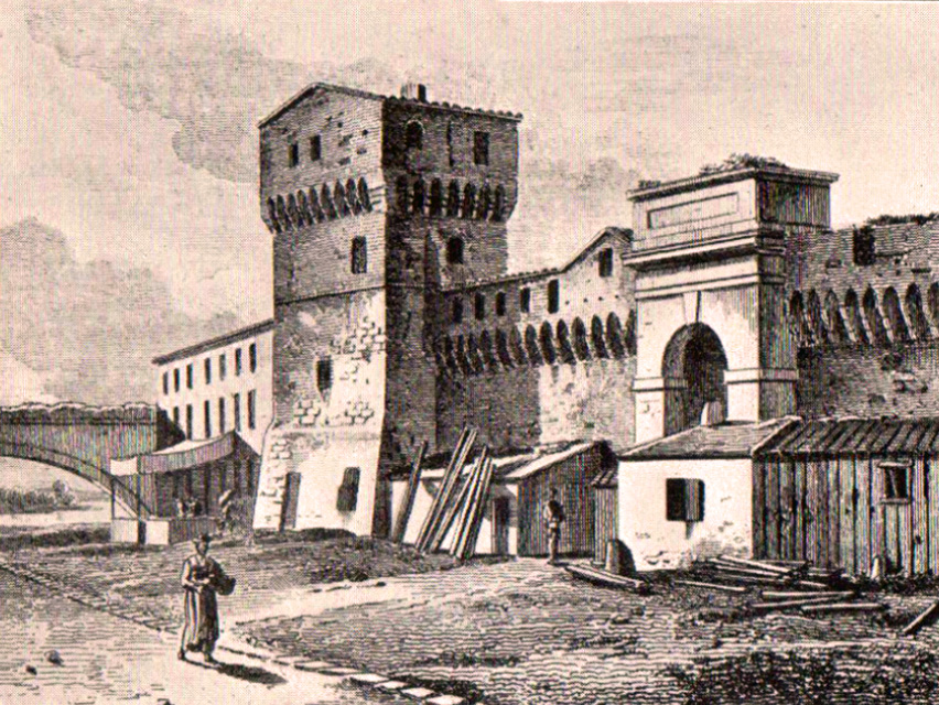 Les remparts d'Avignon transformés en habitation au XIXe siècle